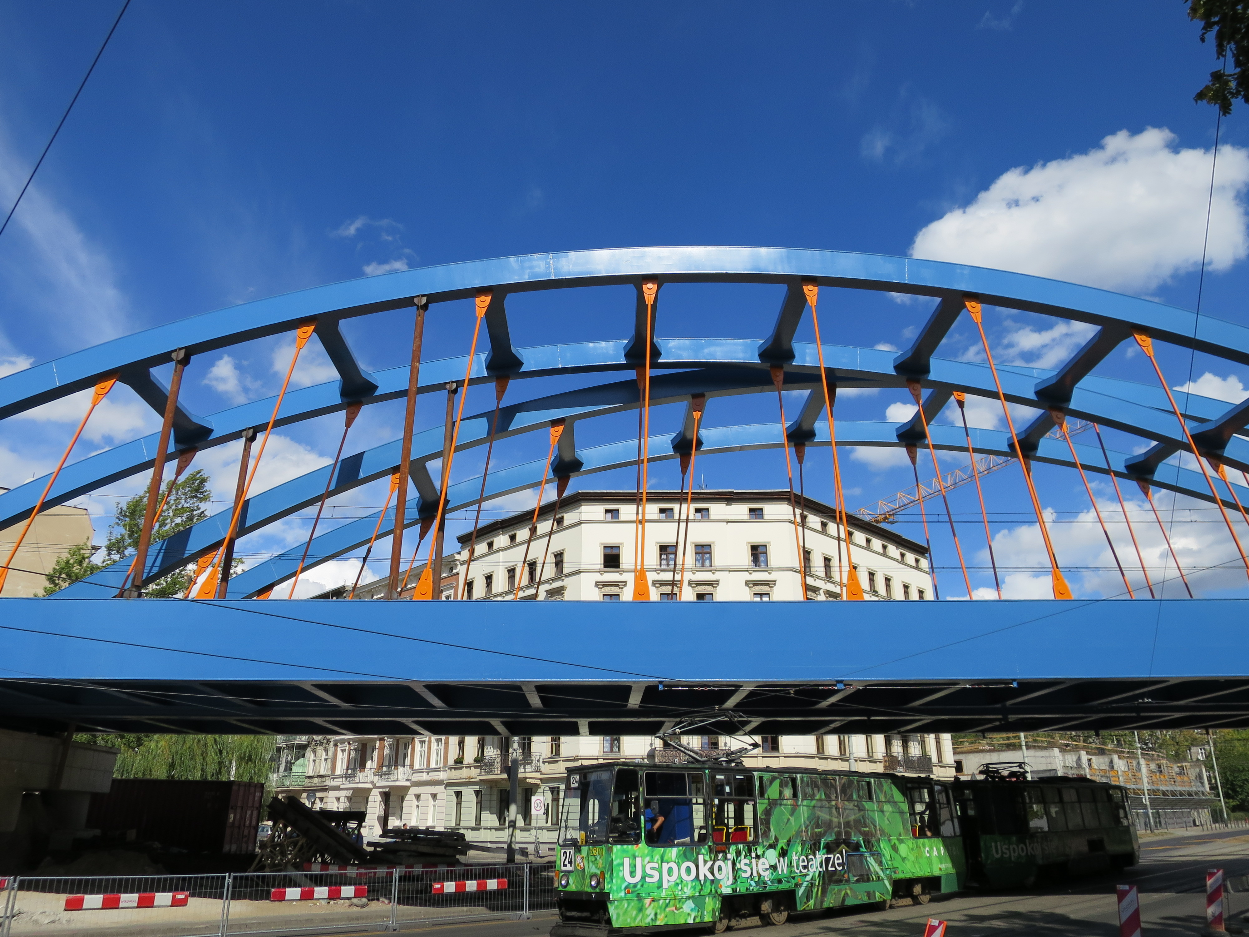 Wiadukt kolejowy przy ul. Grabiszynskiej we Wrocławiu This photo was taken during Railway Wikiexpedition 2015 set up by Wikimedia Polska Association in cooperation with Fundacja Grupy PKP. You can see all photographs in category Wikiekspedycja kolejowa 2015.